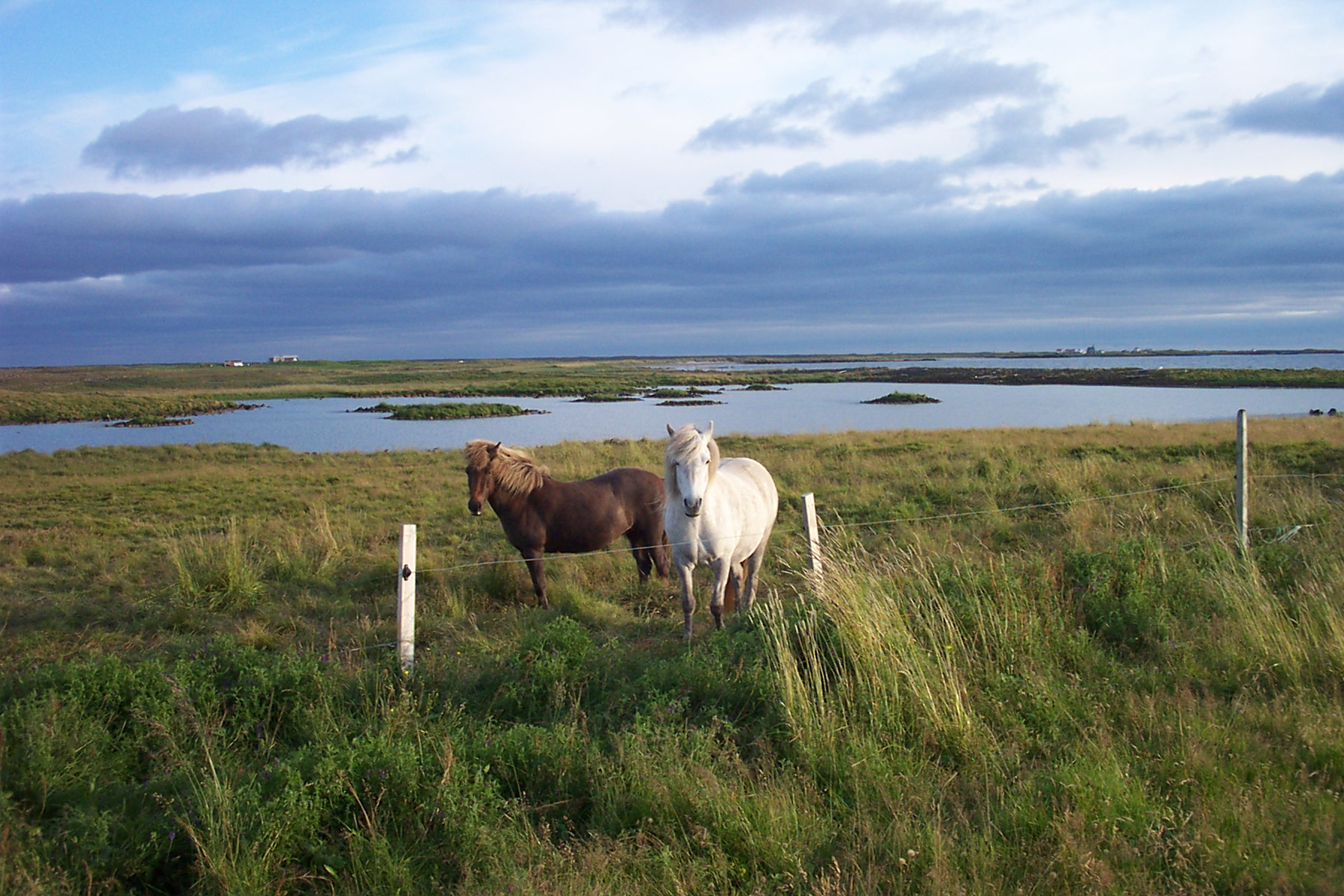 Hestar í Fuglavík á Miðnesi. Ljósmynd: Davíð Ásgeirsson.